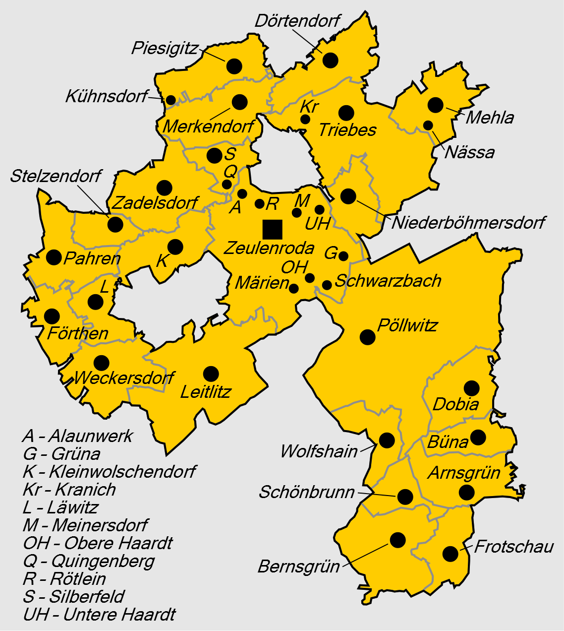 Gliederung der Stadt Zeulenroda-Triebes ab 31. Dezember 2012